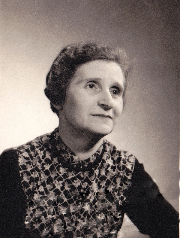 Photographie de Lucie Vellere